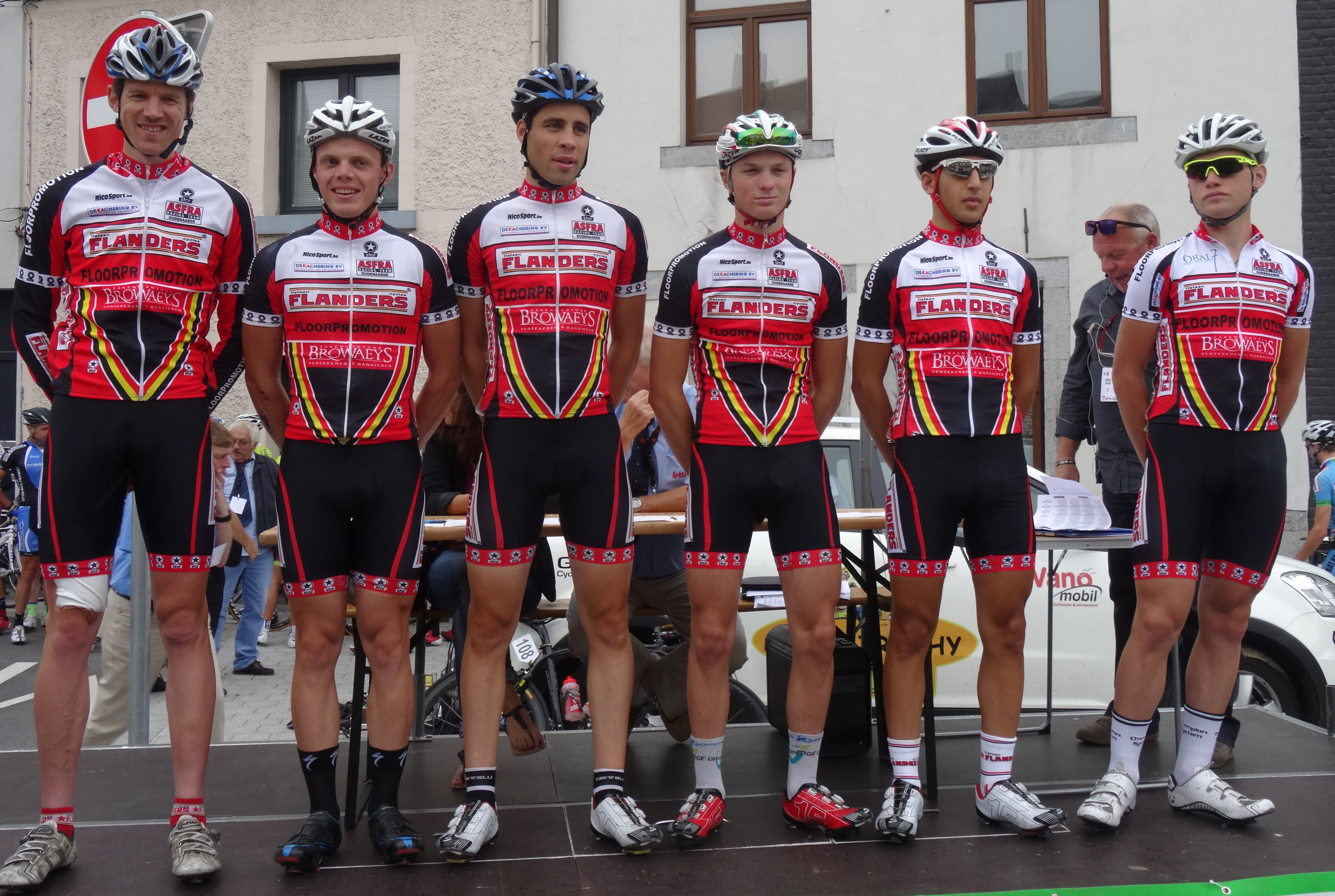 Reportage photographique réalisé le mercredi 6 août à l'occasion du départ de la première étape du Tour de la province de Namur 2014 à Jambes (Namur), Belgique.